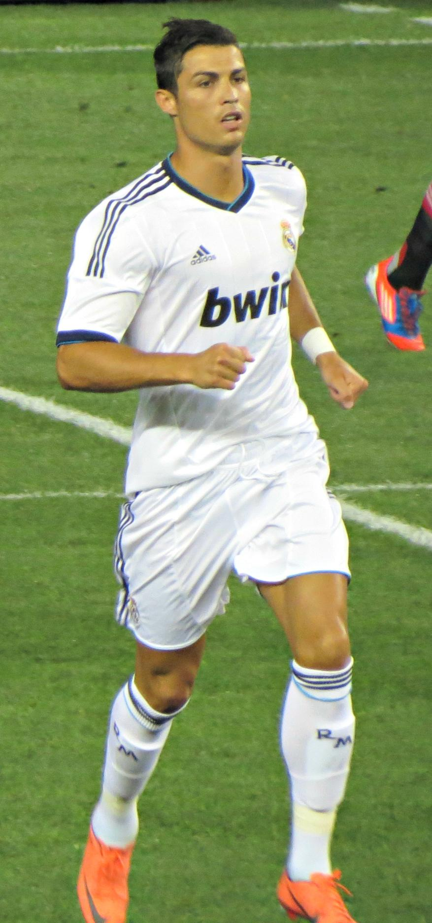 Cristiano Ronaldo, Real Madrid formasıyla.